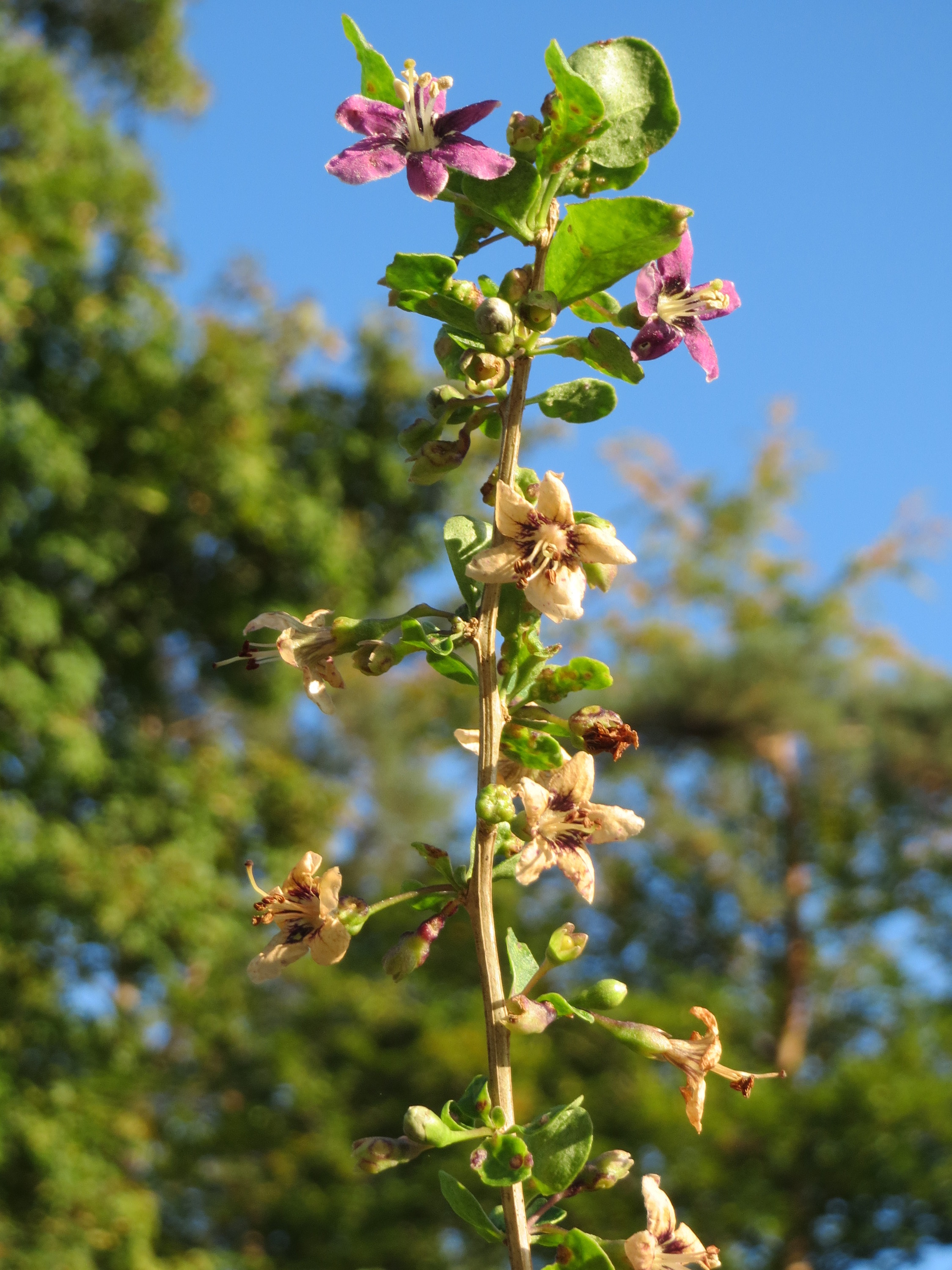 Gemeiner Bocksdorn (Lycium barbarum) im Schwetzinger Hardt